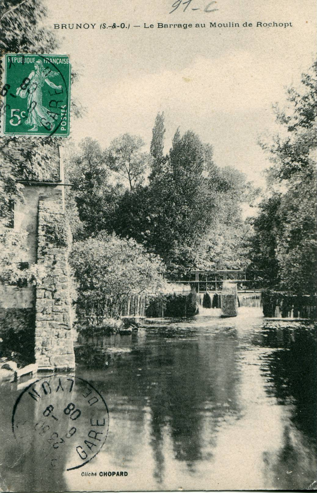 Carte postale ancienne éditée par ChopardBoussy-Saint-Antoine - Le Barrage au Moulin de Rochopt